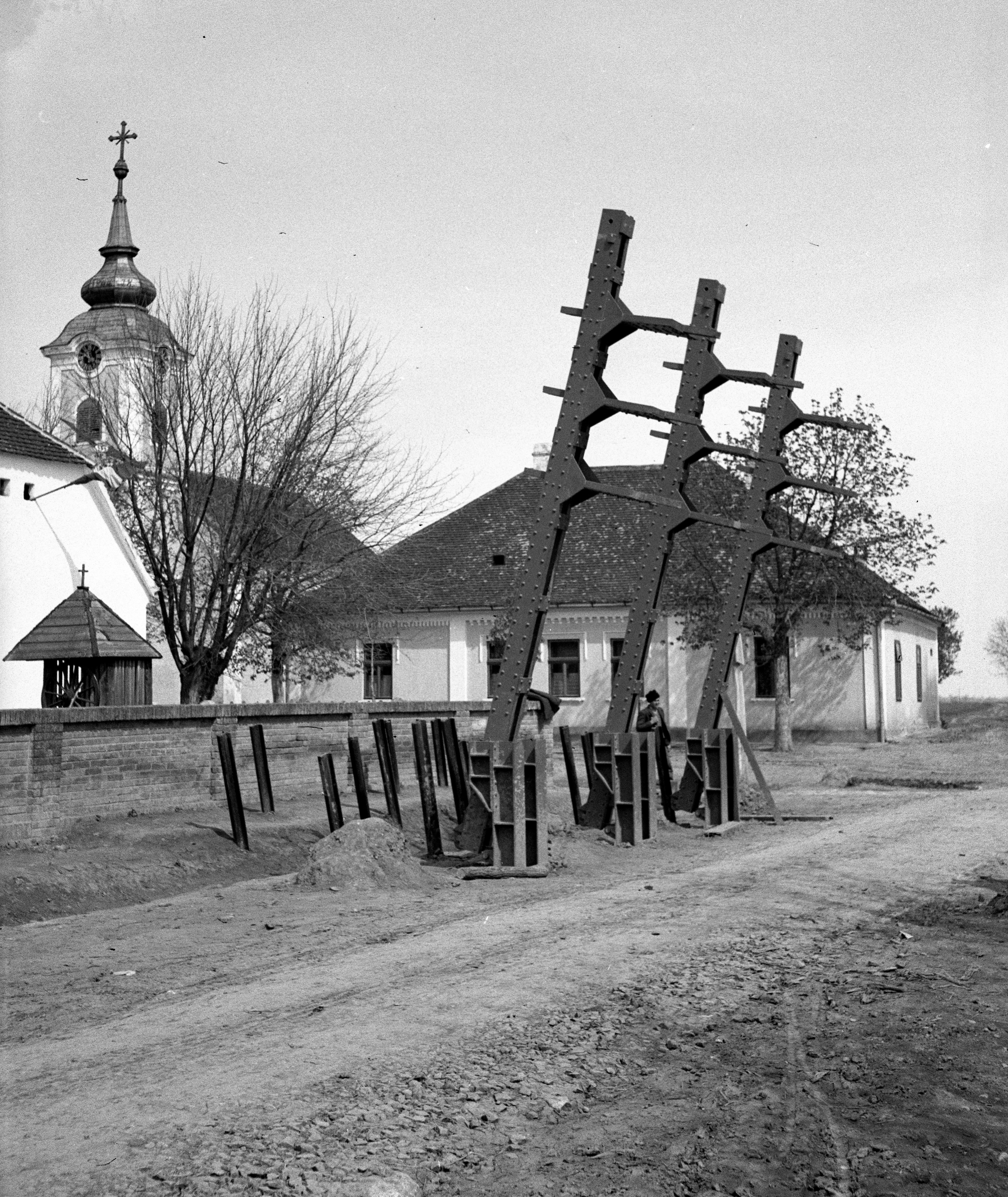 útakadály a falu központjában, háttérben a római katolikus templom. Location: Croatia, Petlovac Tags: road block, church, well Title: útakadály a falu központjában, háttérben a római katolikus templom.